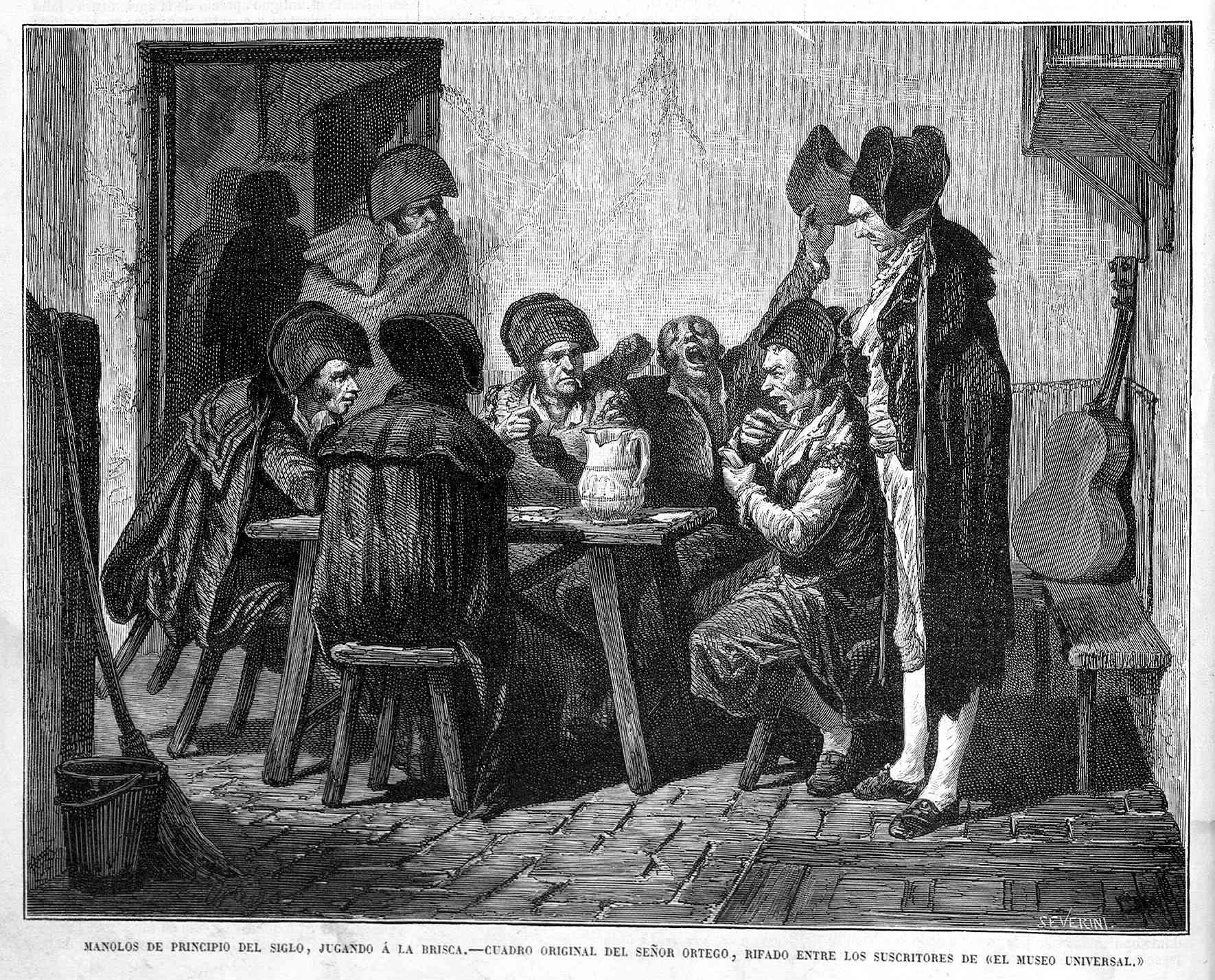 Manolos de principio de siglo, jugando a la brisca, en la revista española El Museo Universal.